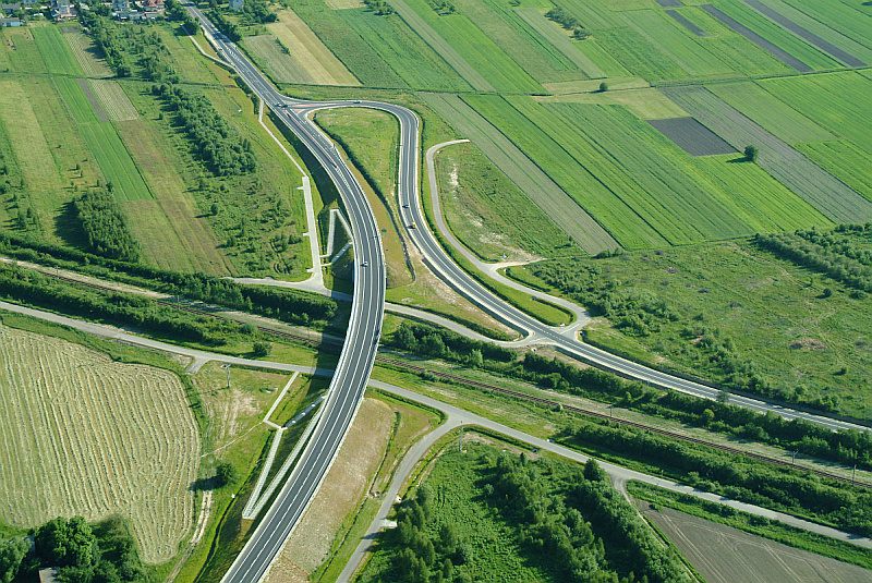 zdjęcie lotnicze - węzeł łączący obwodnicę Stojadeł będącej nowym przebiegiem DK 50 (lewa dół) z dotychczasowym przebiegiem (prawa dół - poprzedni przebieg i góra dalsza część DK 50). Pod wiaduktem linia kolejowa nr 13.